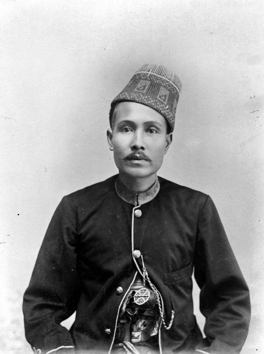 Repronegatief. Portret van de Sultan Muhammad Daud Syah van Atjeh